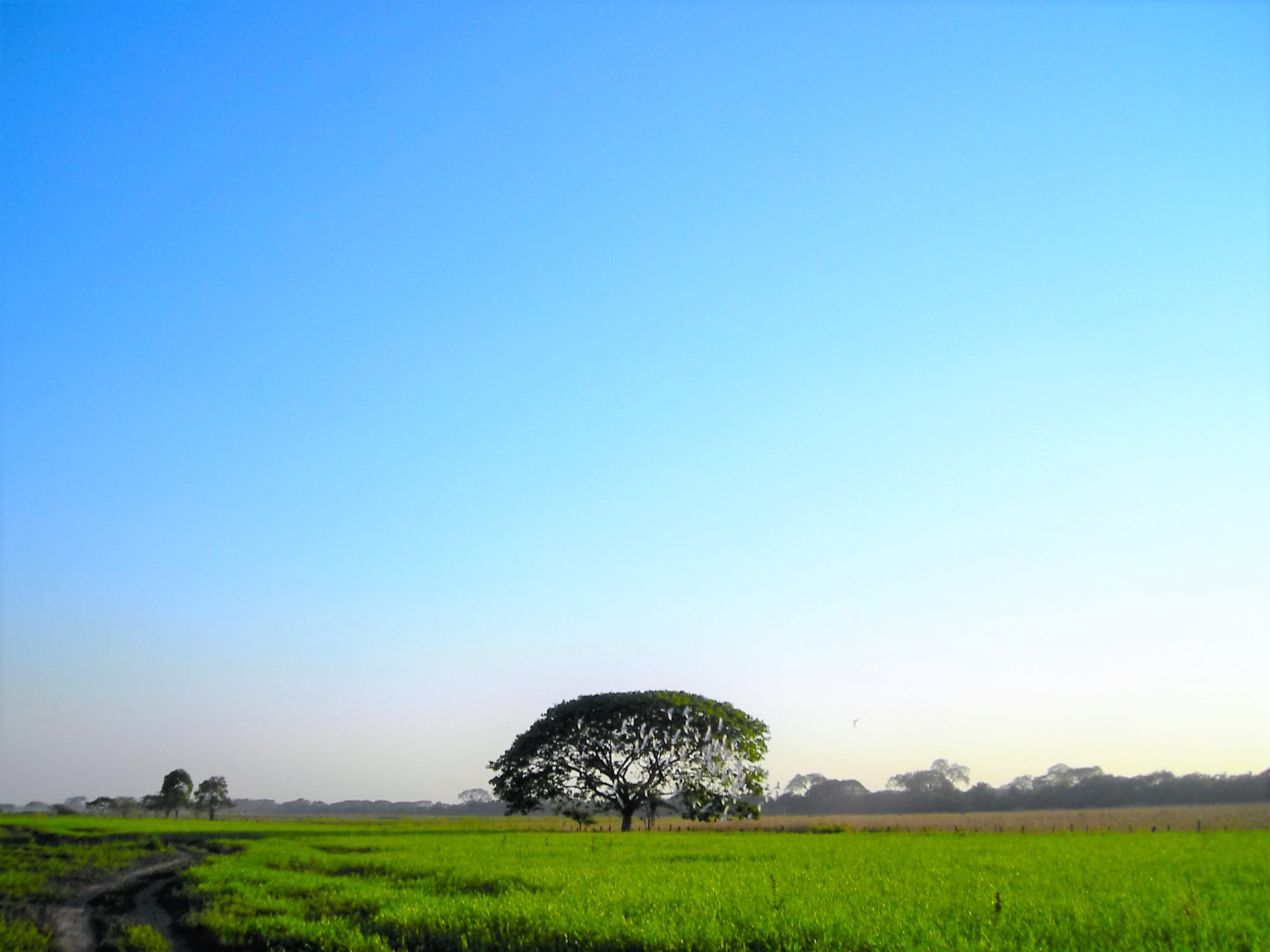 La agricultura es la principal fuente económica del estado Portuguesa